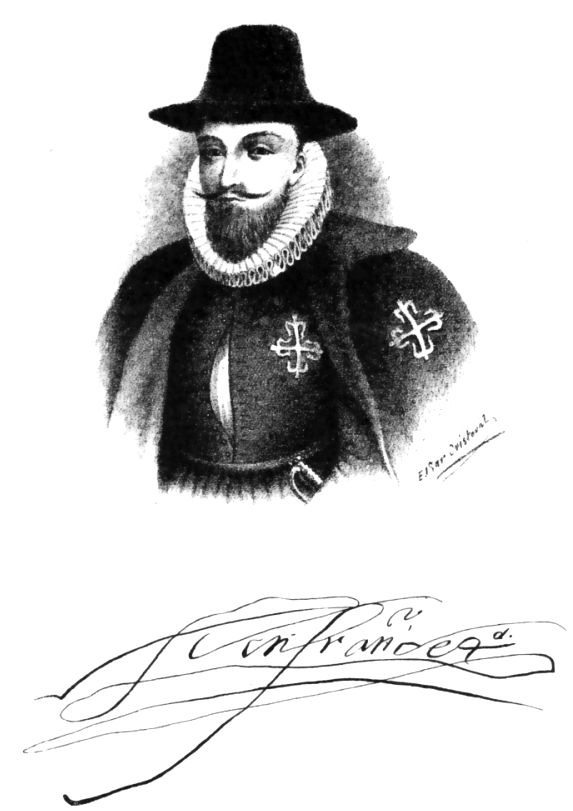 Francisco Álvarez de Toledo, virrey del Perú (1569-1581)